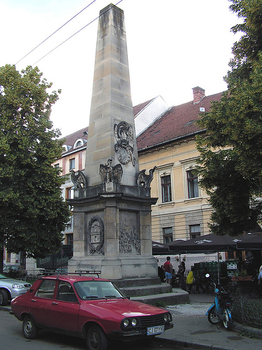 A kolozsvári Karolina-oszlop, Pasztilla jóvoltából és engedélyével.